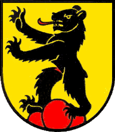 Wappen der politischen Gemeinde Arisdorf, Schweiz